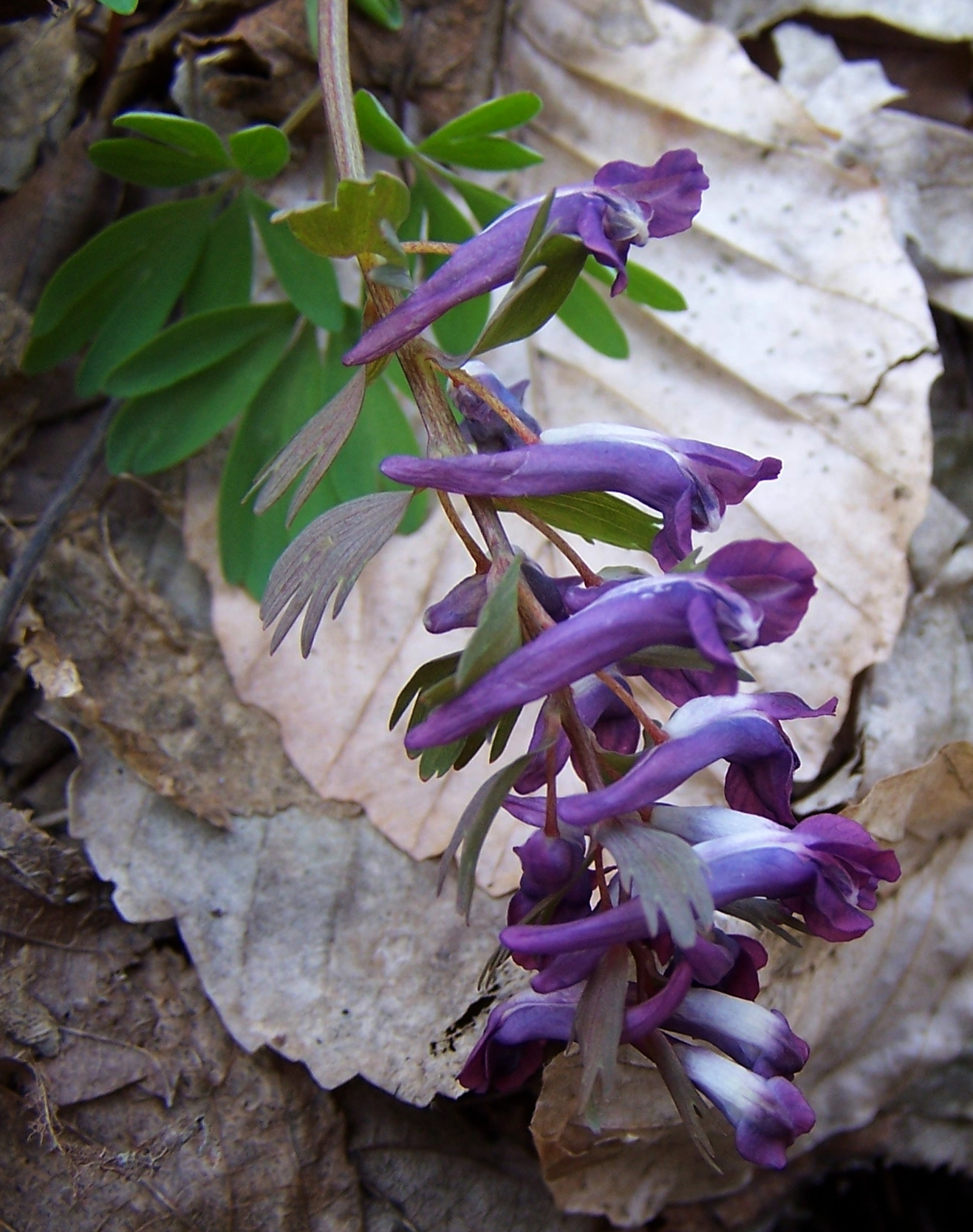 Corydalis solida (pl. kokorycz pełna)